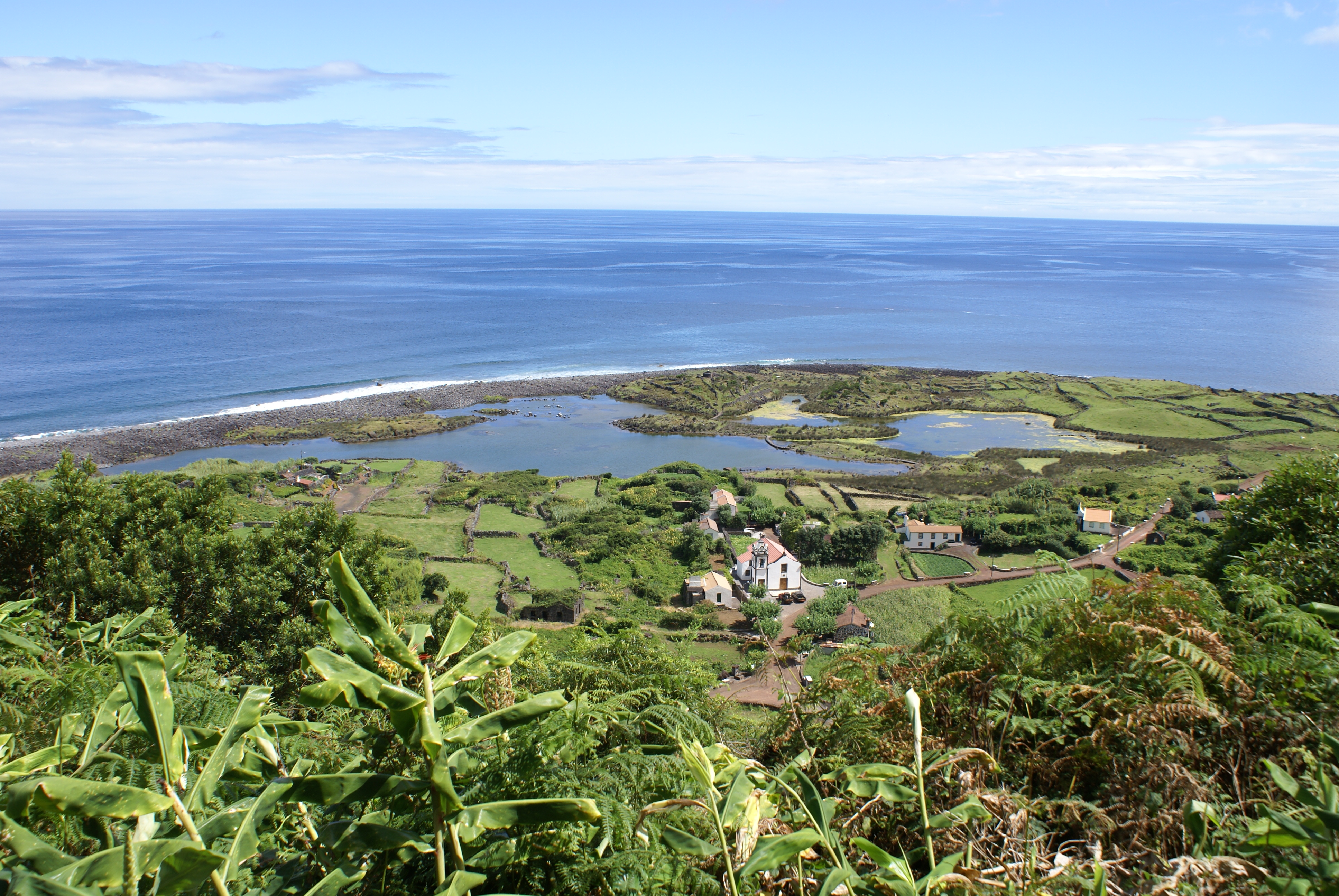 Lagoa da Fajã dos Cubres, Calheta, ilha de São Jorge, Açores